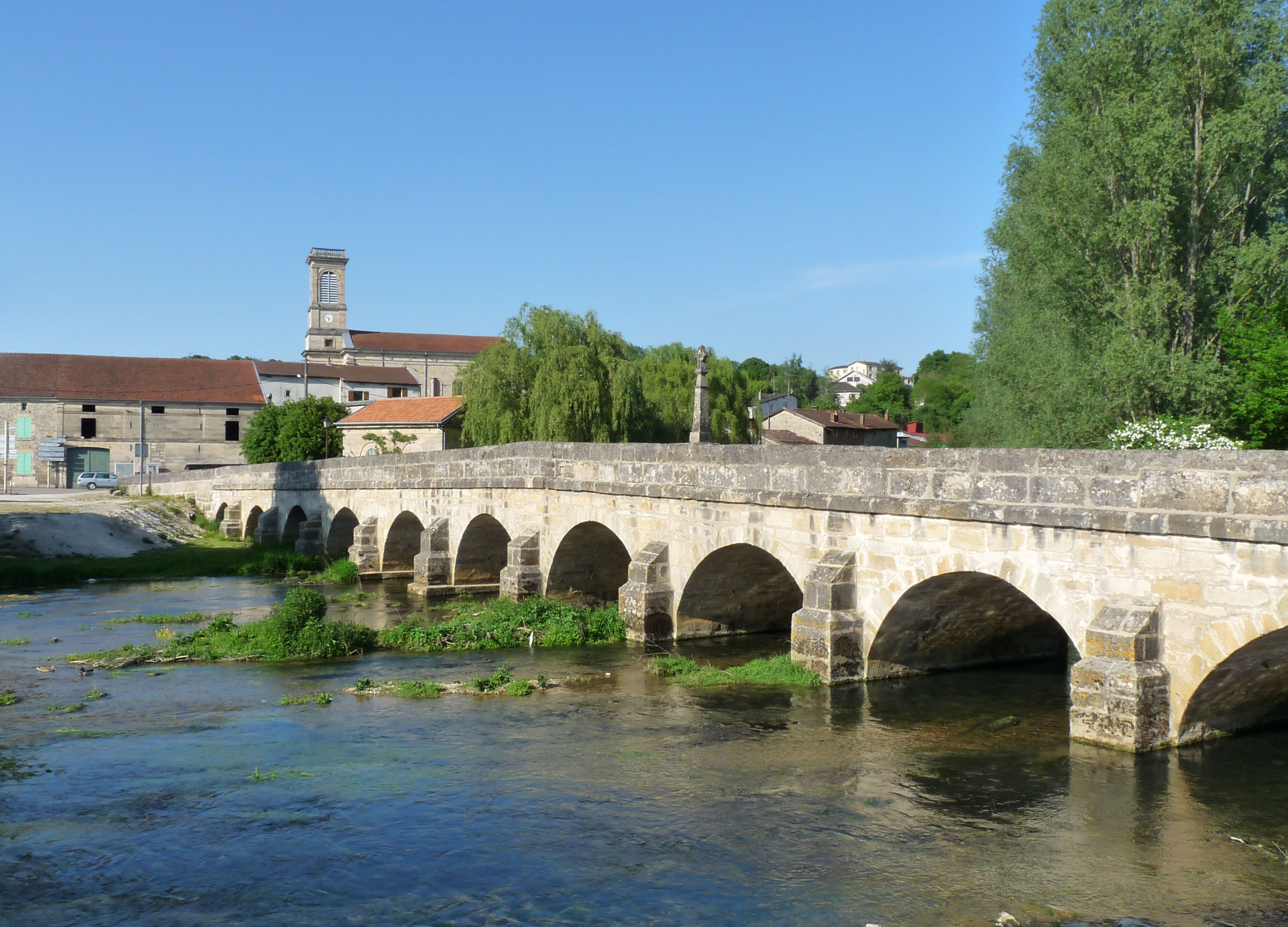 Pont sur la Saulx à Haironville (Meuse). Inscrit aux Monuments historiques en 1950.